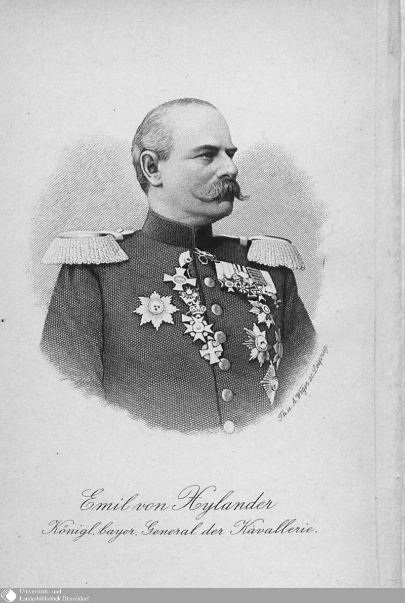 Joseph Anton Emil Ritter und Edler von Xylander (* 20. Februar 1835 in Frankfurt am Main; † 7. Oktober 1911 in München) war ein bayerischer Offizier, zuletzt Generaloberst der Kavallerie.